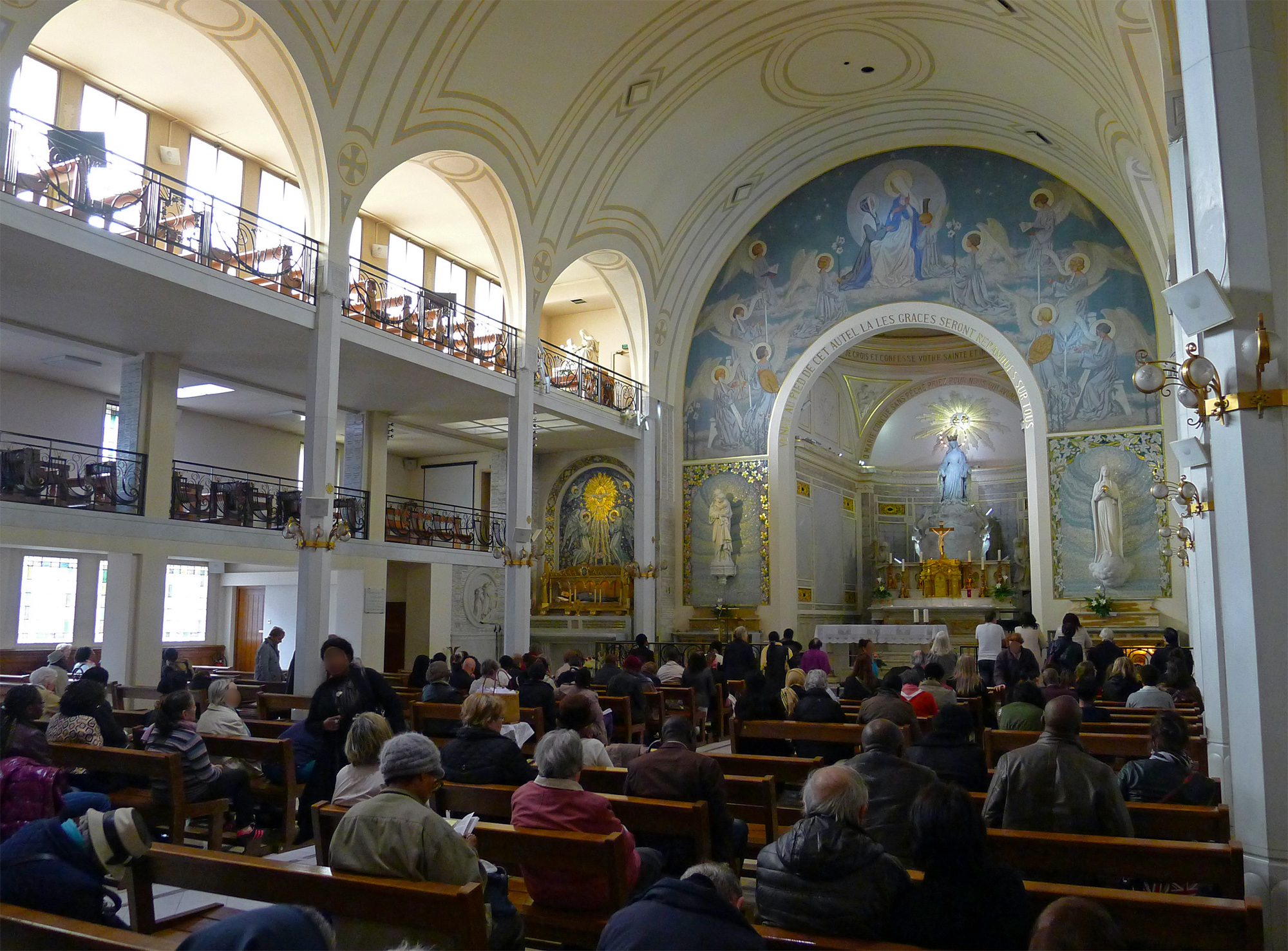 Chapelle Notre-Dame-de-la-Médaille-miraculeuse (assistance dans la nef) - Paris VII .